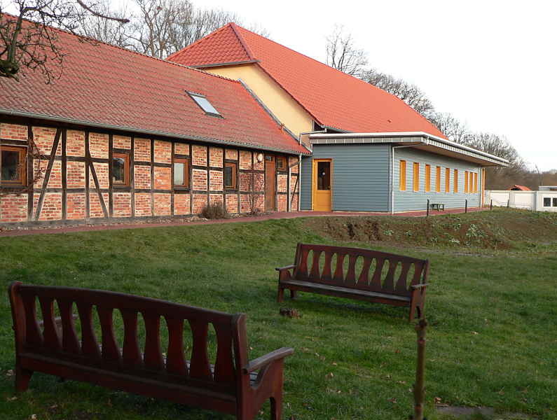 Adolphshof